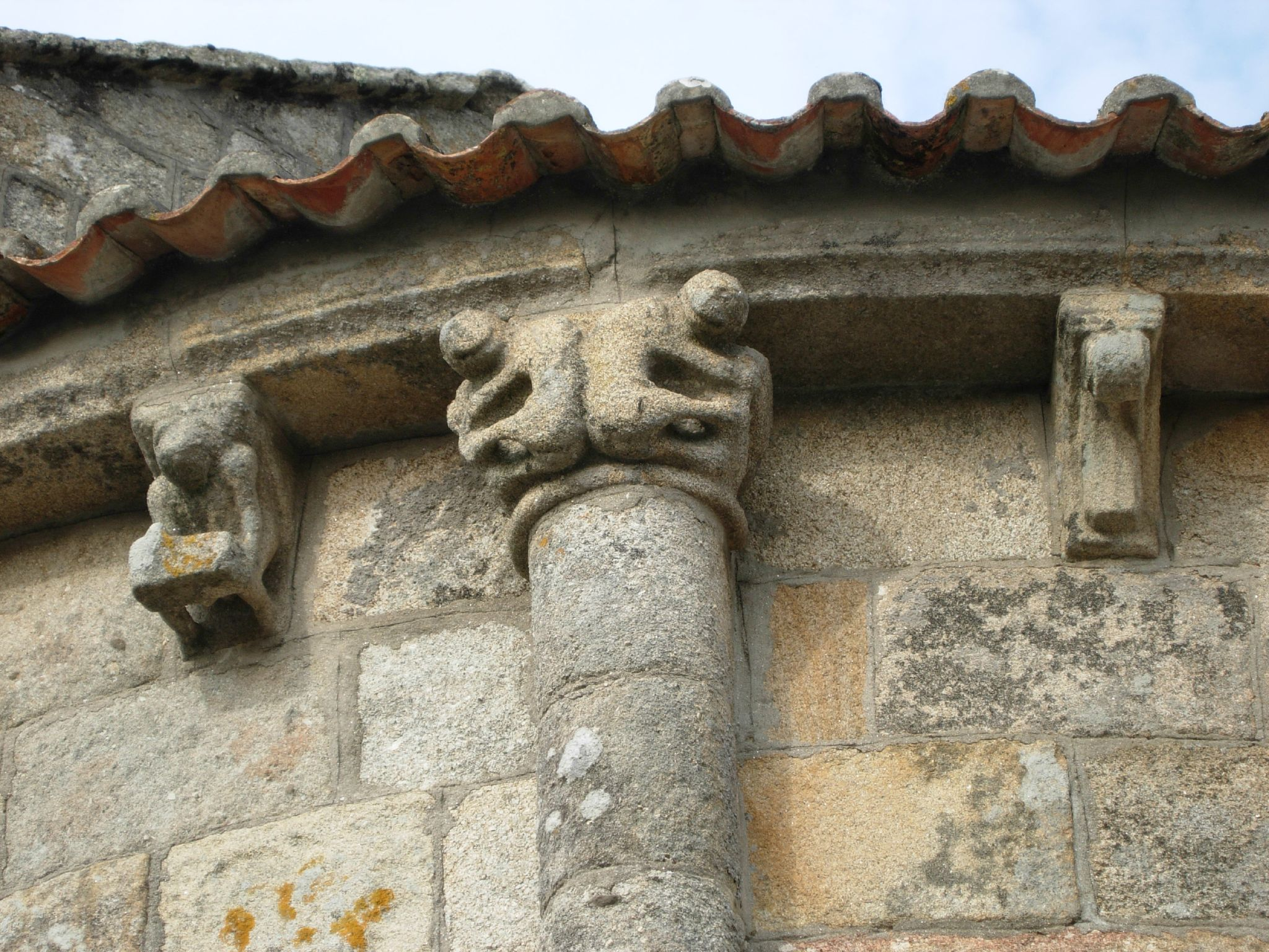 Capitel e canzorros da ábsida da Igrexa de San MArtiño de Sobrán - Vilagarcía de Arousa - Pontevedra